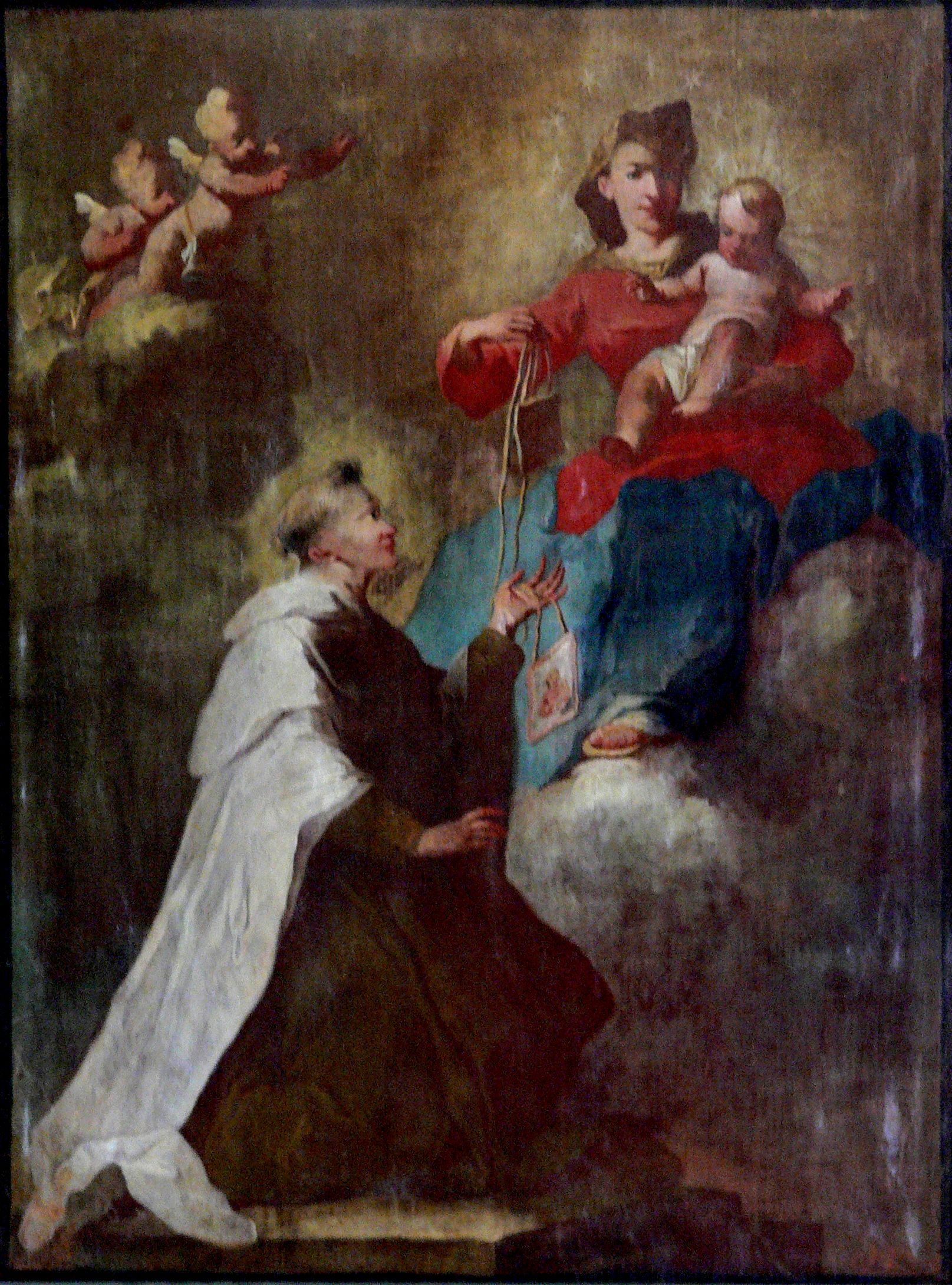 Wallfahrtskirche Maria zum Berge Karmel, Baitenhausen, Stadt Meersburg, Bodenseekreis Prozessionsfahne, Anfang 18. Jh., A. Bastian zugeschrieben; Motiv: Maria reicht dem Generaloberen der Karmeliten, Simon Stock, das Skapulier